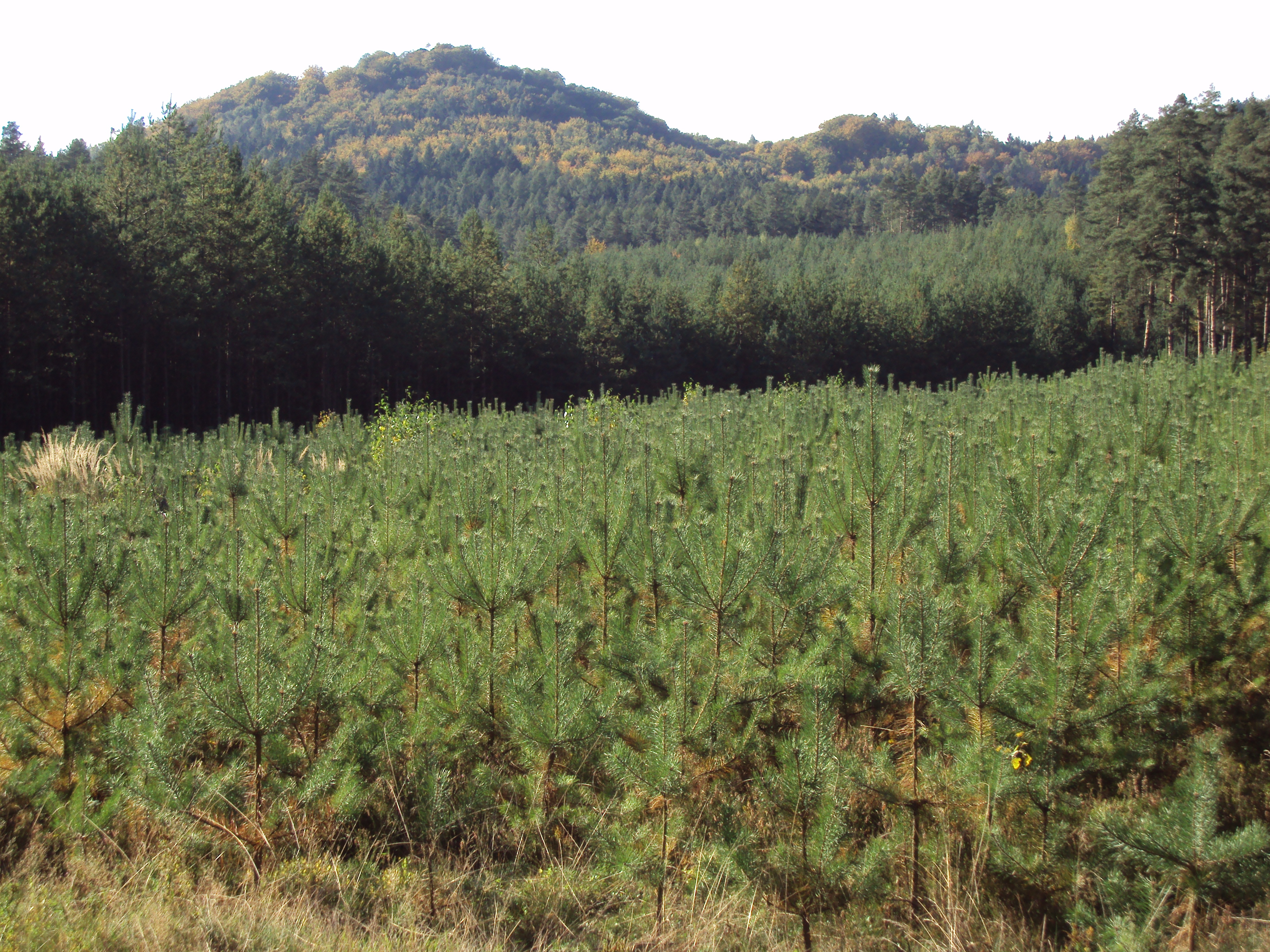 Přírodní památka Malý a Velký Jelenní vrch asi 3,5 km na jih od Hamr na Jezeře